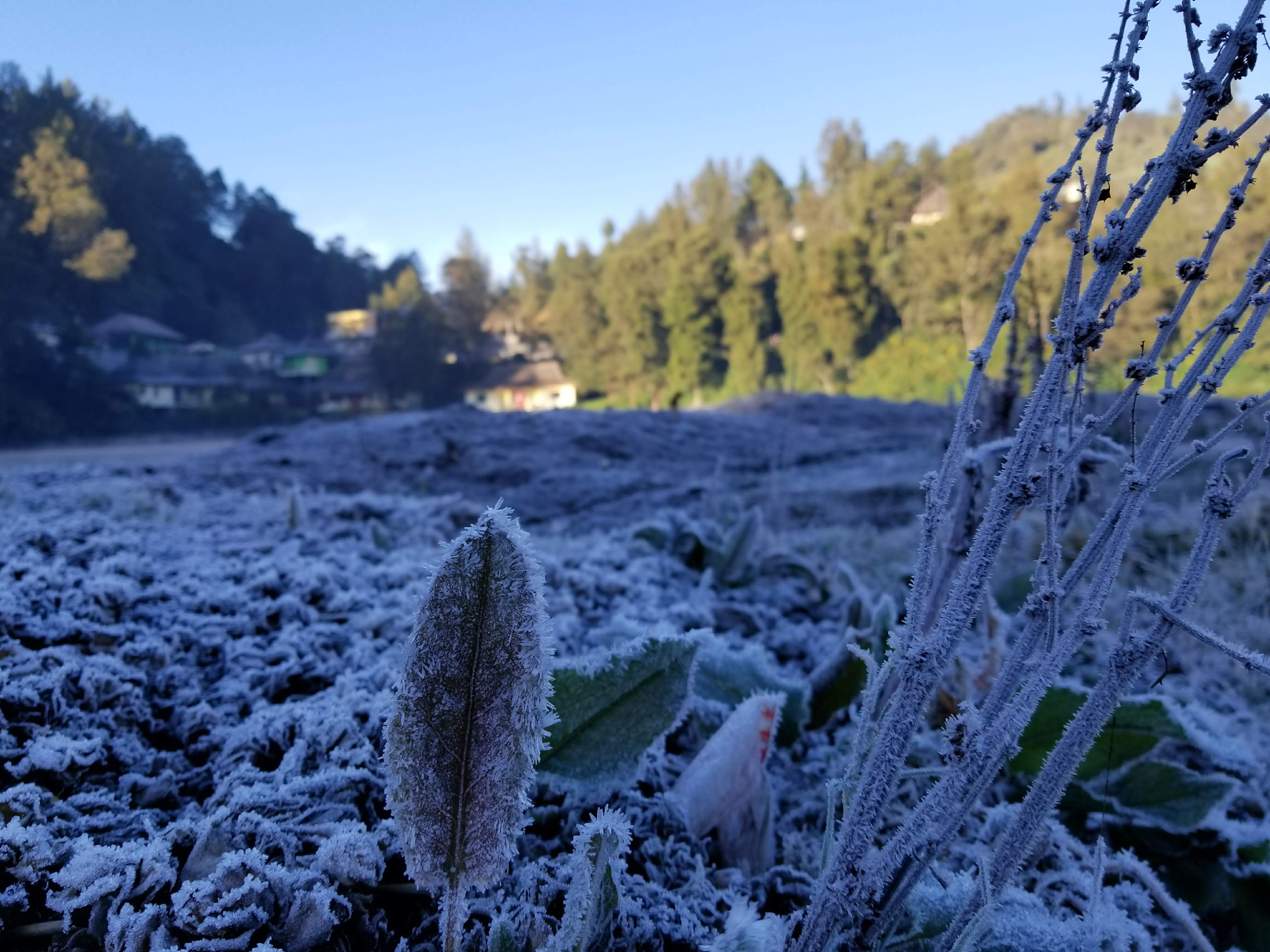 Salju di Ranu Pani 4 Agustus 2018 by Susanto Tan